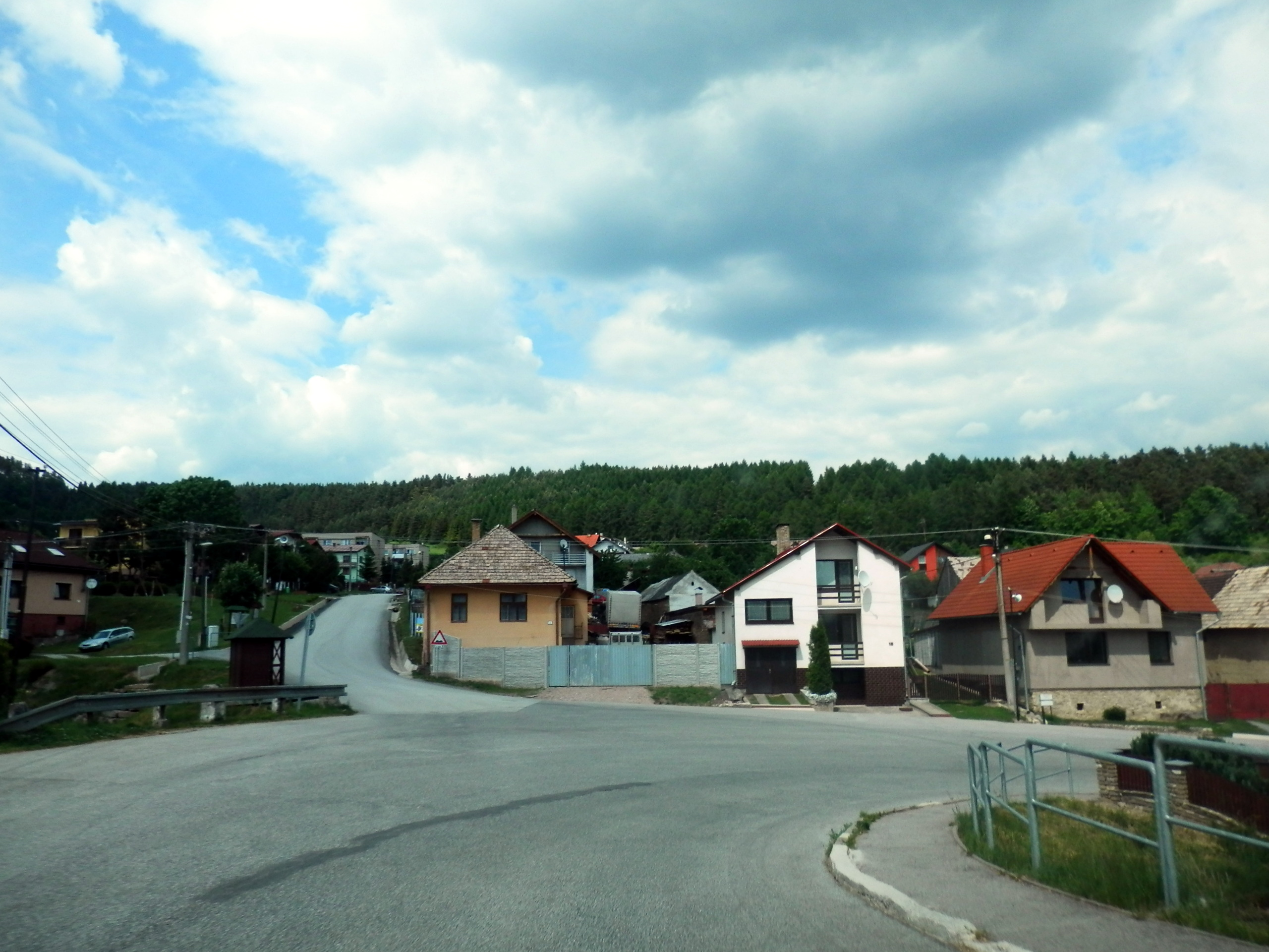 Intravilán obce Dravce, okres Levoča.